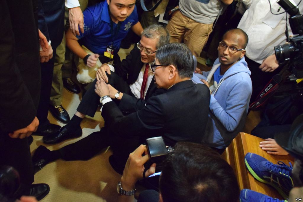 中文（香港）: 香港大學副校長任命事件